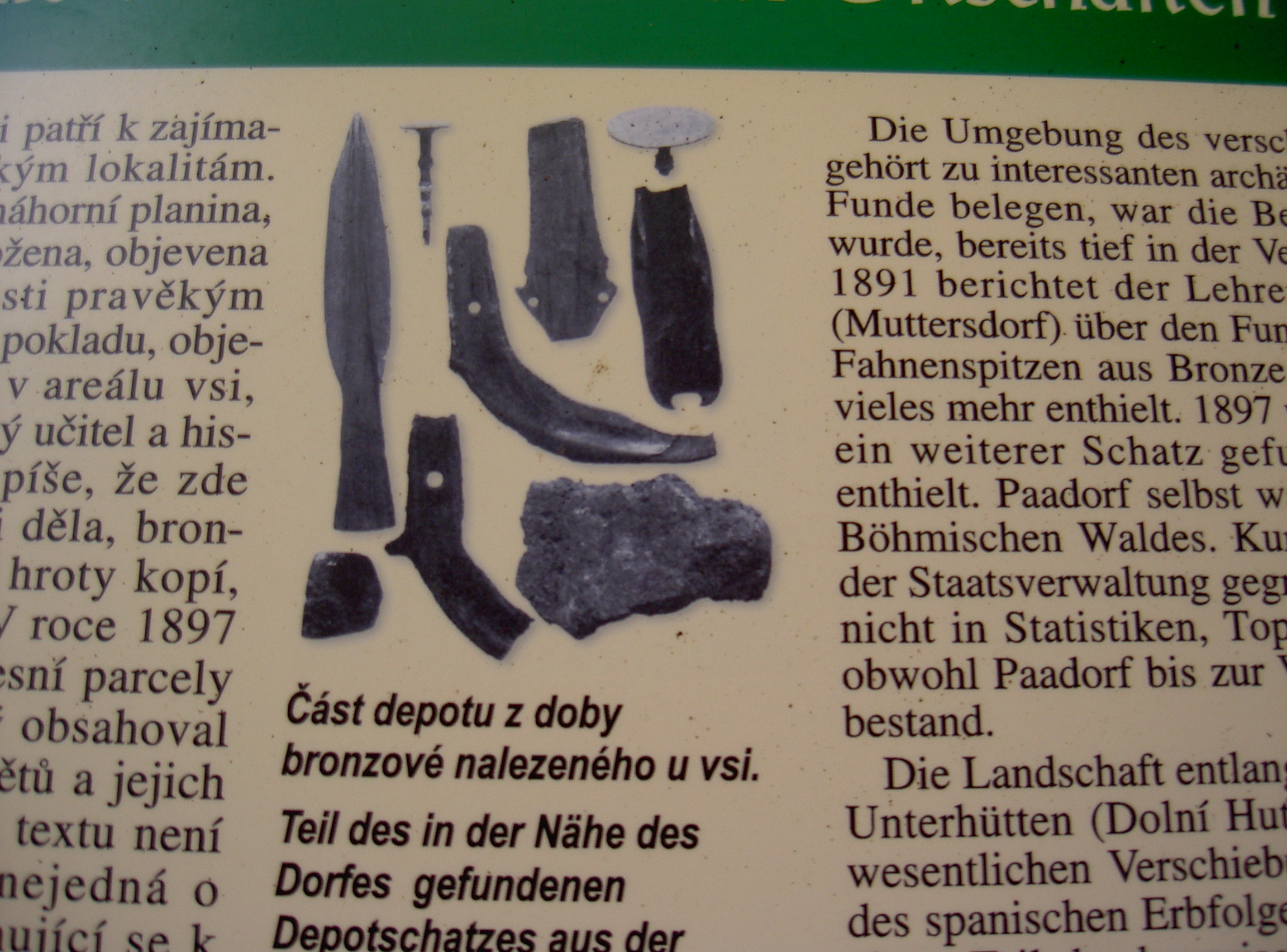 Paadorf